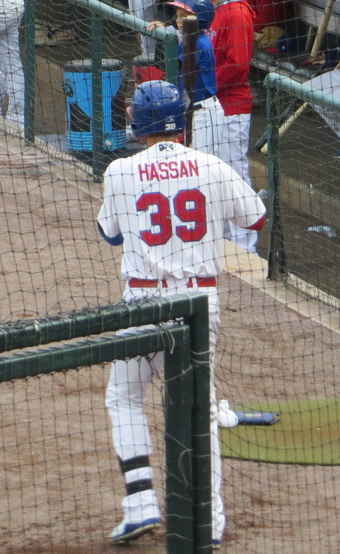 Alex Hassan